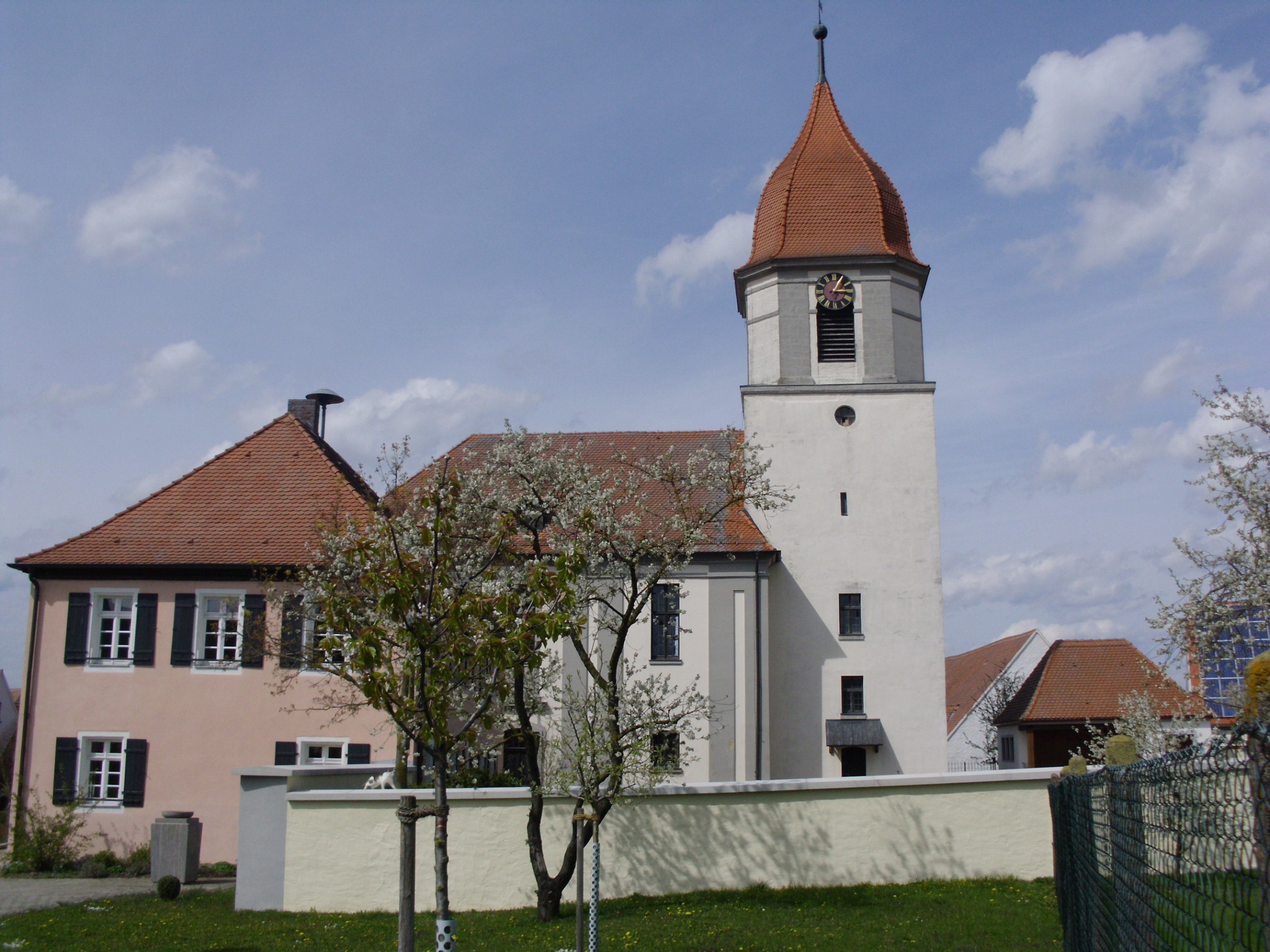 Sammenheim, Ortsteil der Gemeinde Dittenheim im mittelfränkischen Landkreis Weißenburg-Gunzenhausen, Kirche und Evangelisches Gemeindehaus